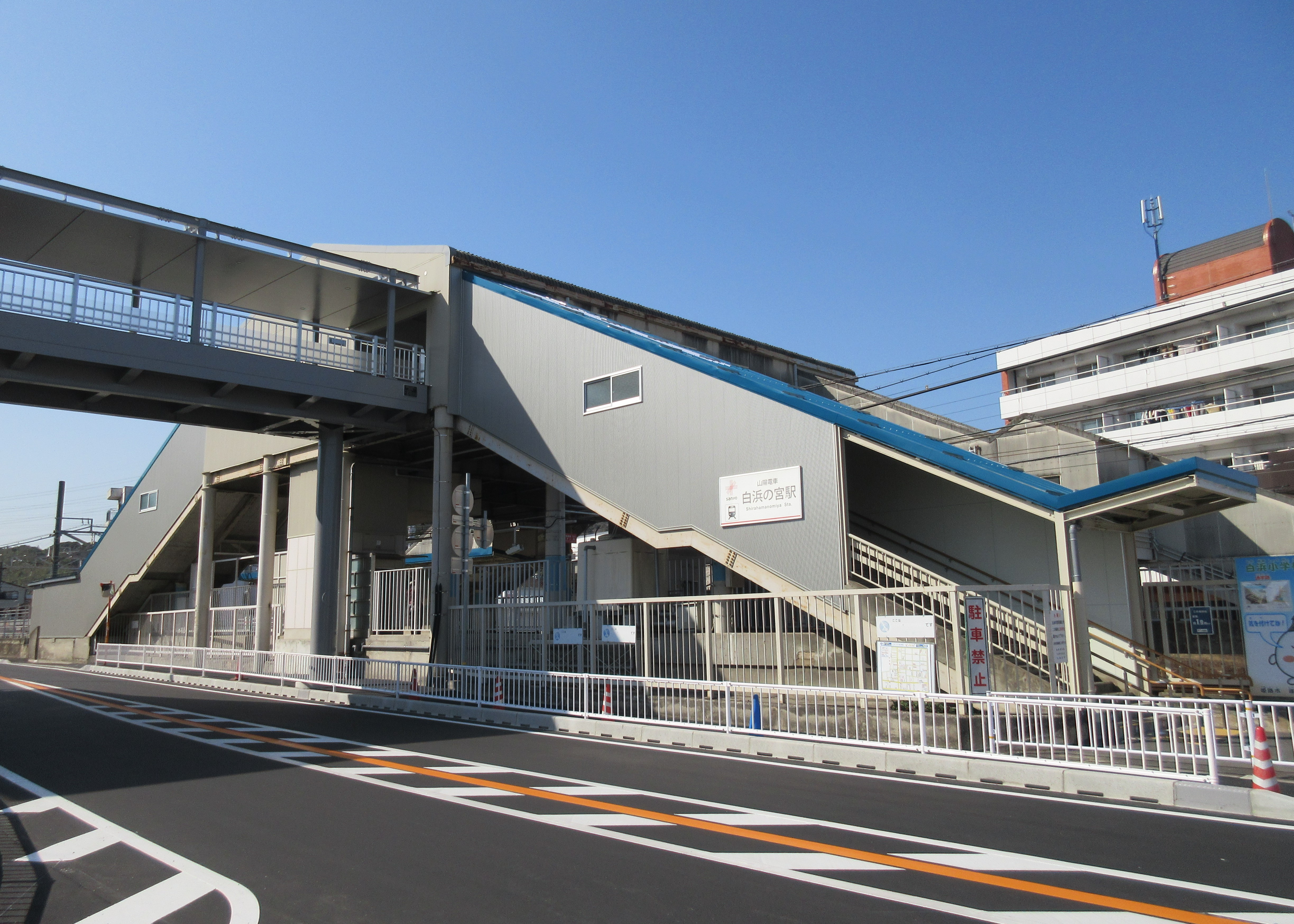 山陽電鉄白浜の宮駅